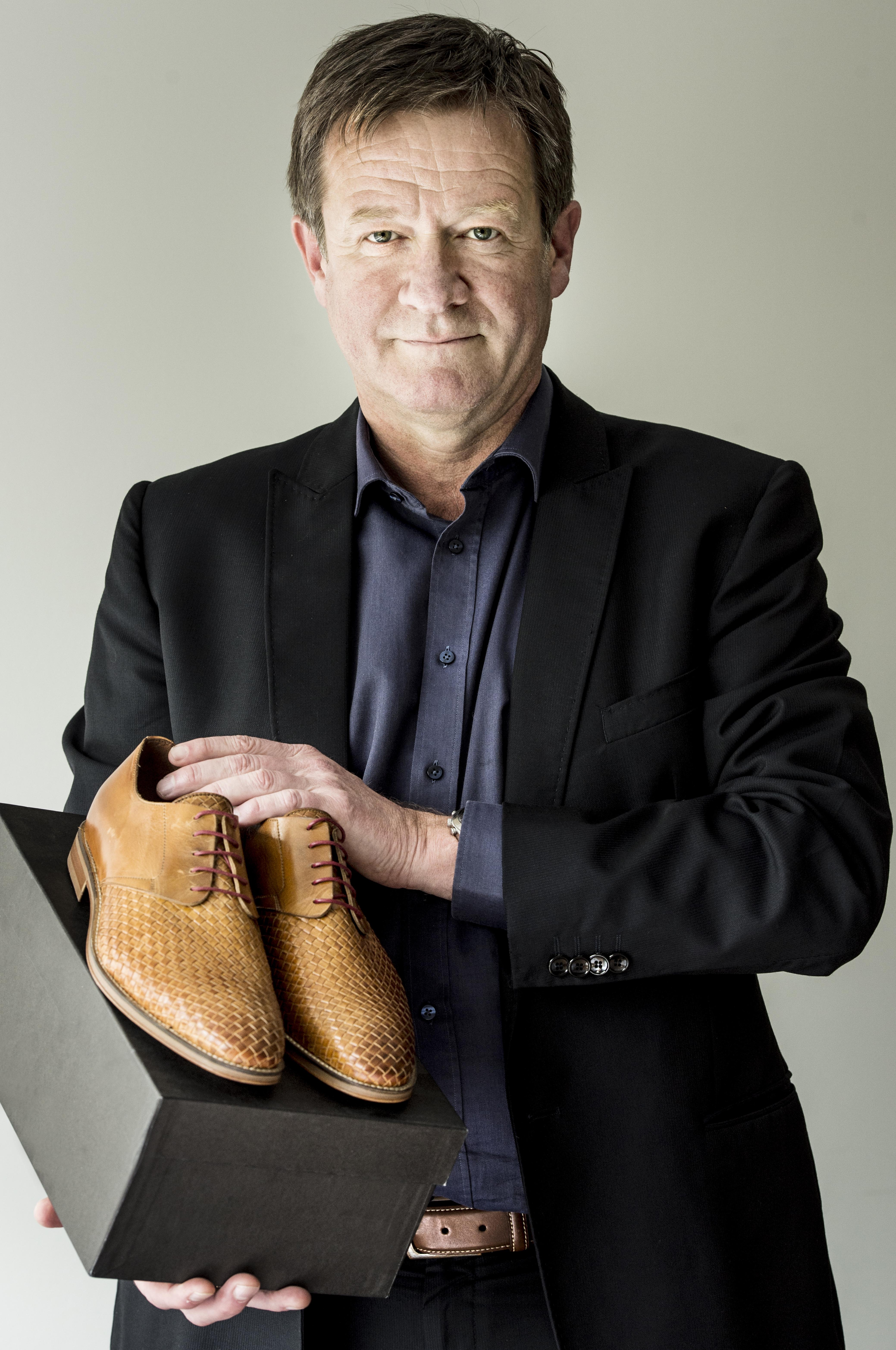 Wouters Torfs